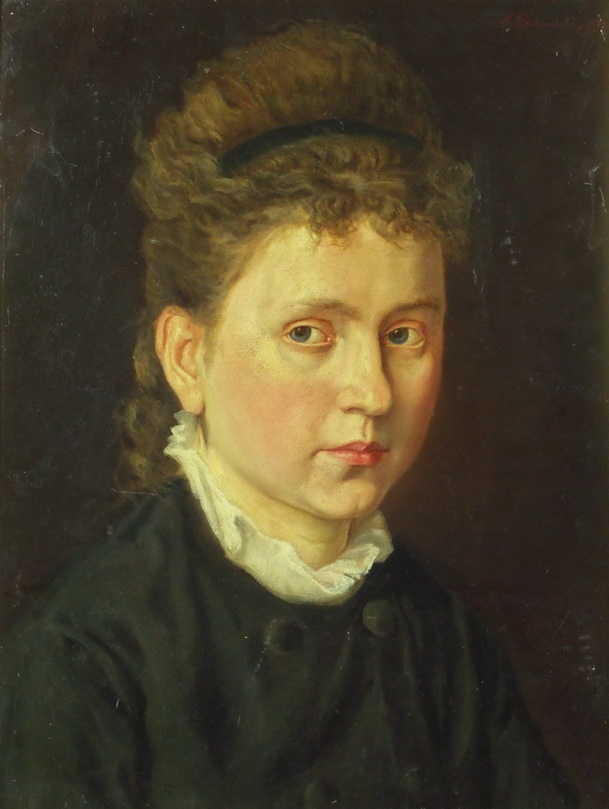 Portret Elizy Orzeszkowej (Muzeum Literatury w Warszawie)